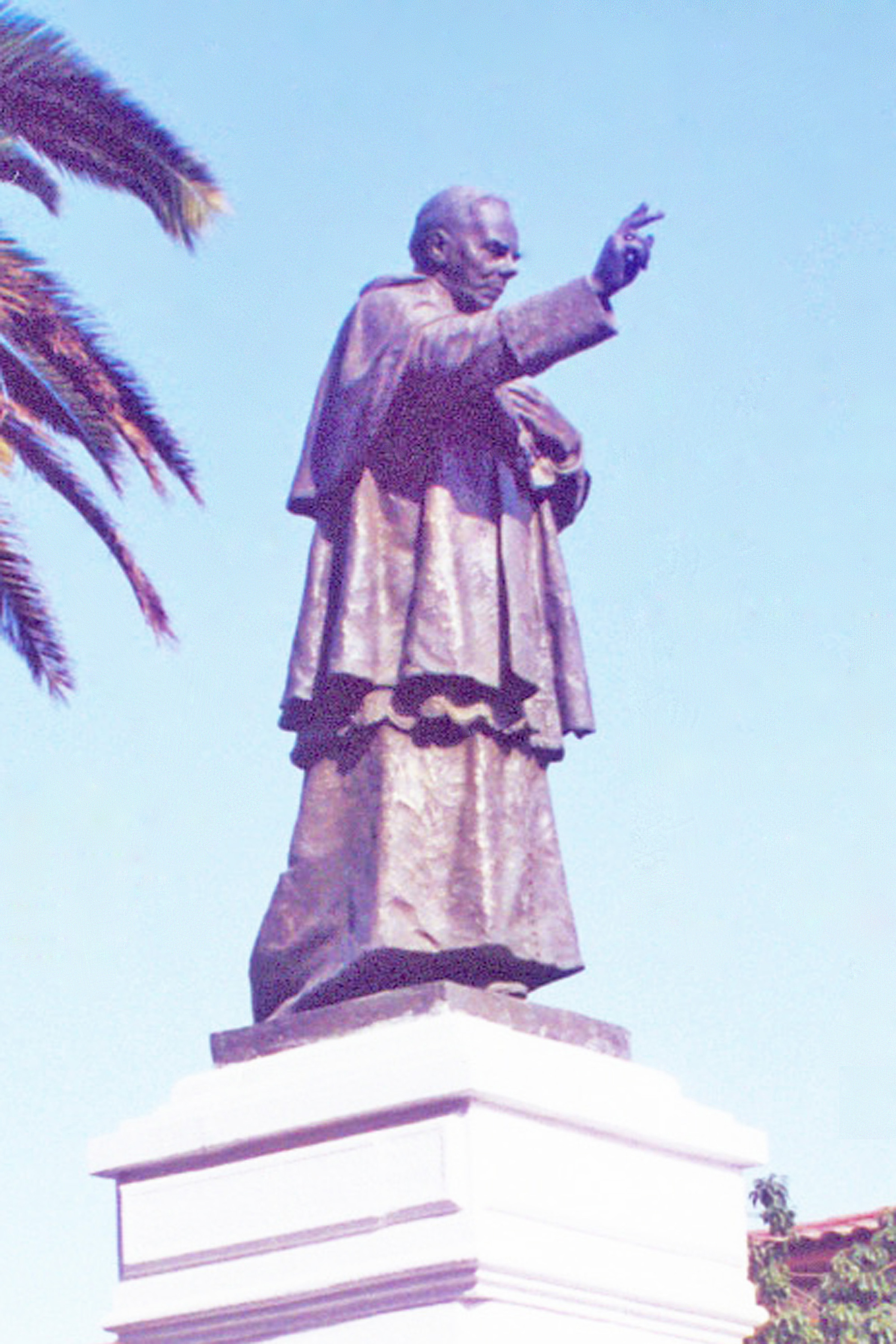 Francisco María del Granado